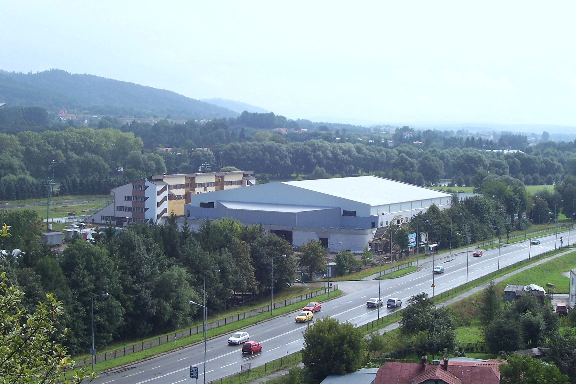 Budowa Areny Sanok 2005